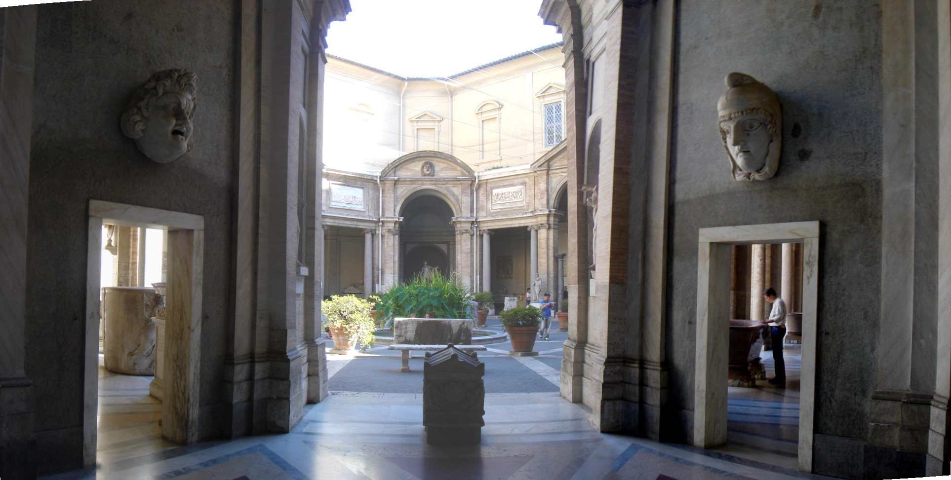 Roma, Musei vaticani: il Cortile ottagono del Belvedere by Lalupa